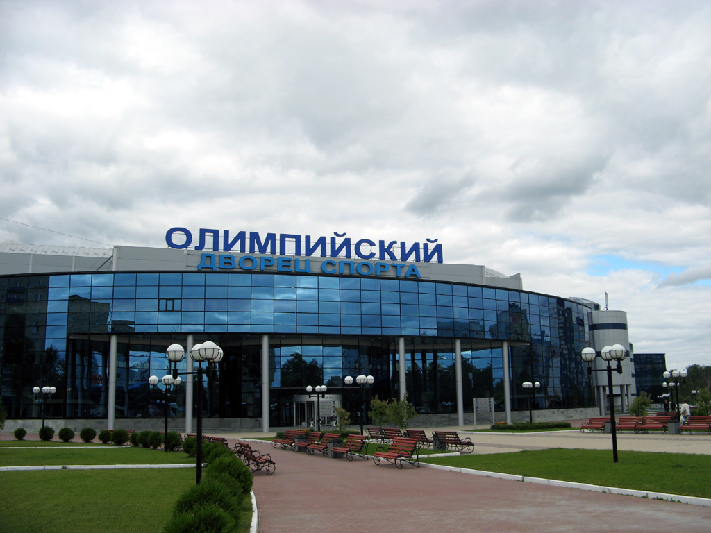 Олимпийский дворец спорта в г. Чехов (Московская область); Olympic Palace of Sport in Chekhov (Moscow Oblast)